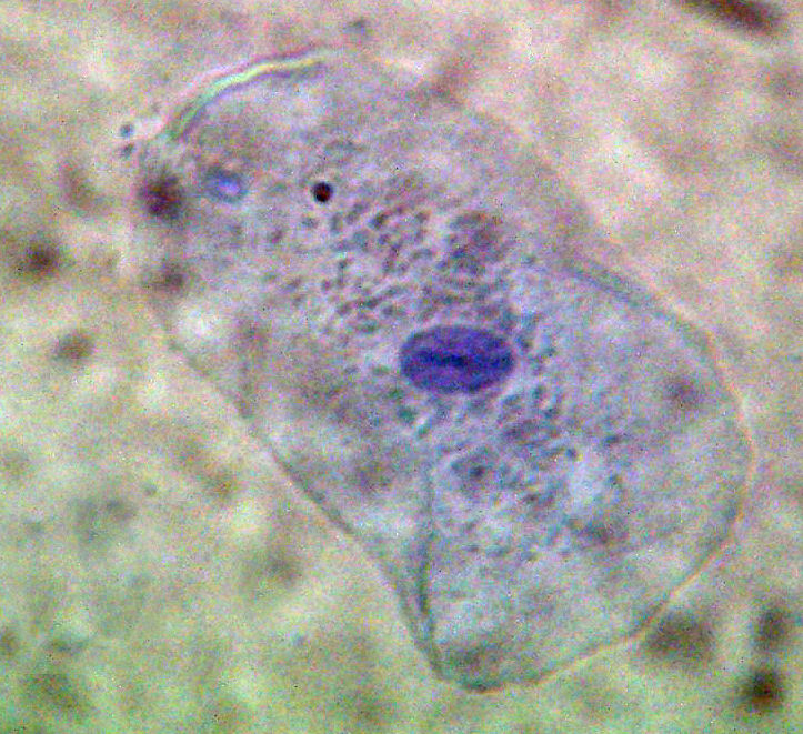 description: Mundschleimhaut des Menschen mit Methylenblau angefärbt author: H. Hoffmeister source: Foto I shot with my Fuji Digicam M603 date: 1.10.2006